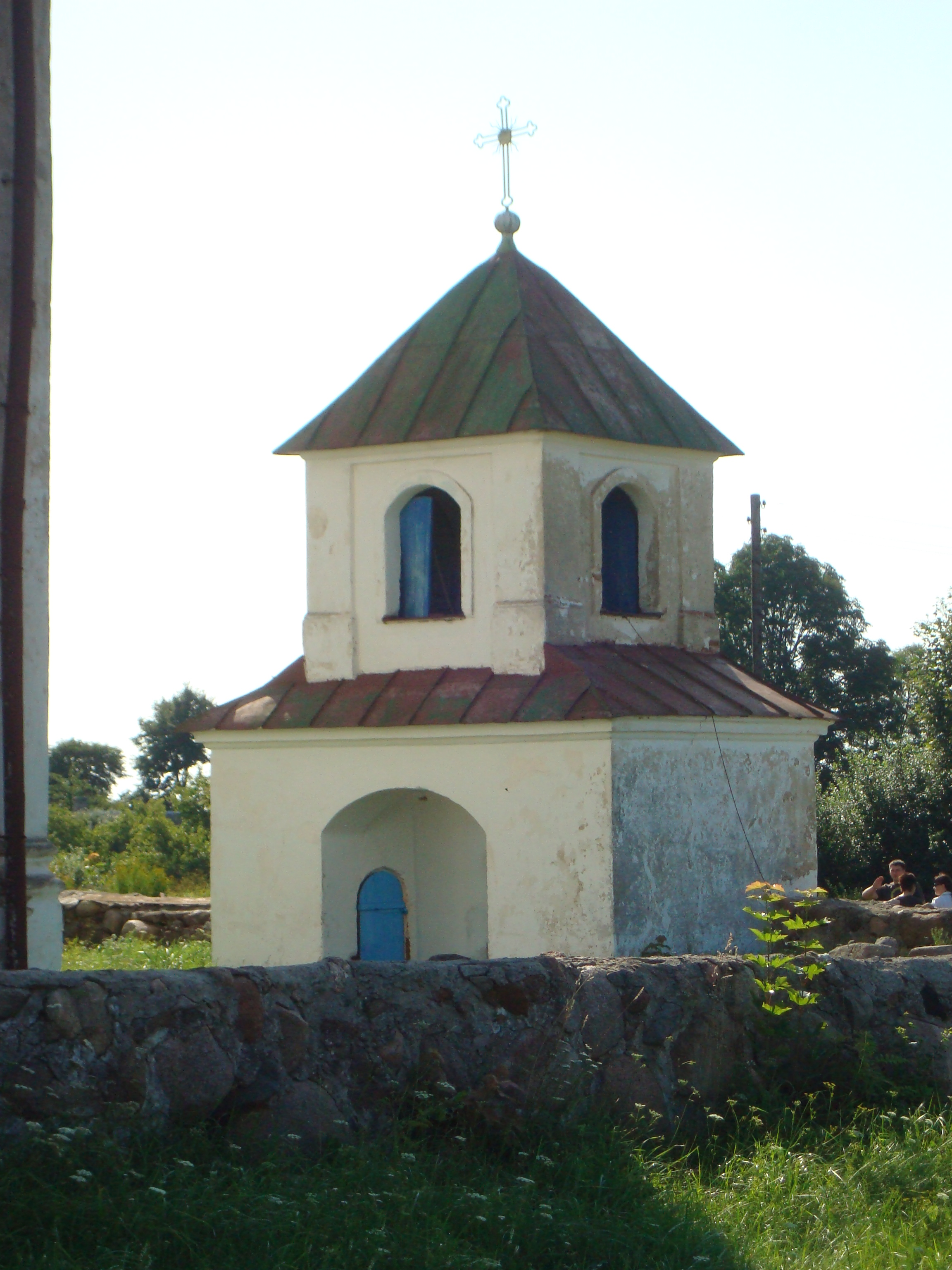 Беларуская (тарашкевіца): Усьпенская царква. в. Бусяж This is a photo of Belarusian heritage monument. Reference number: 112Г000291 ( WLM)